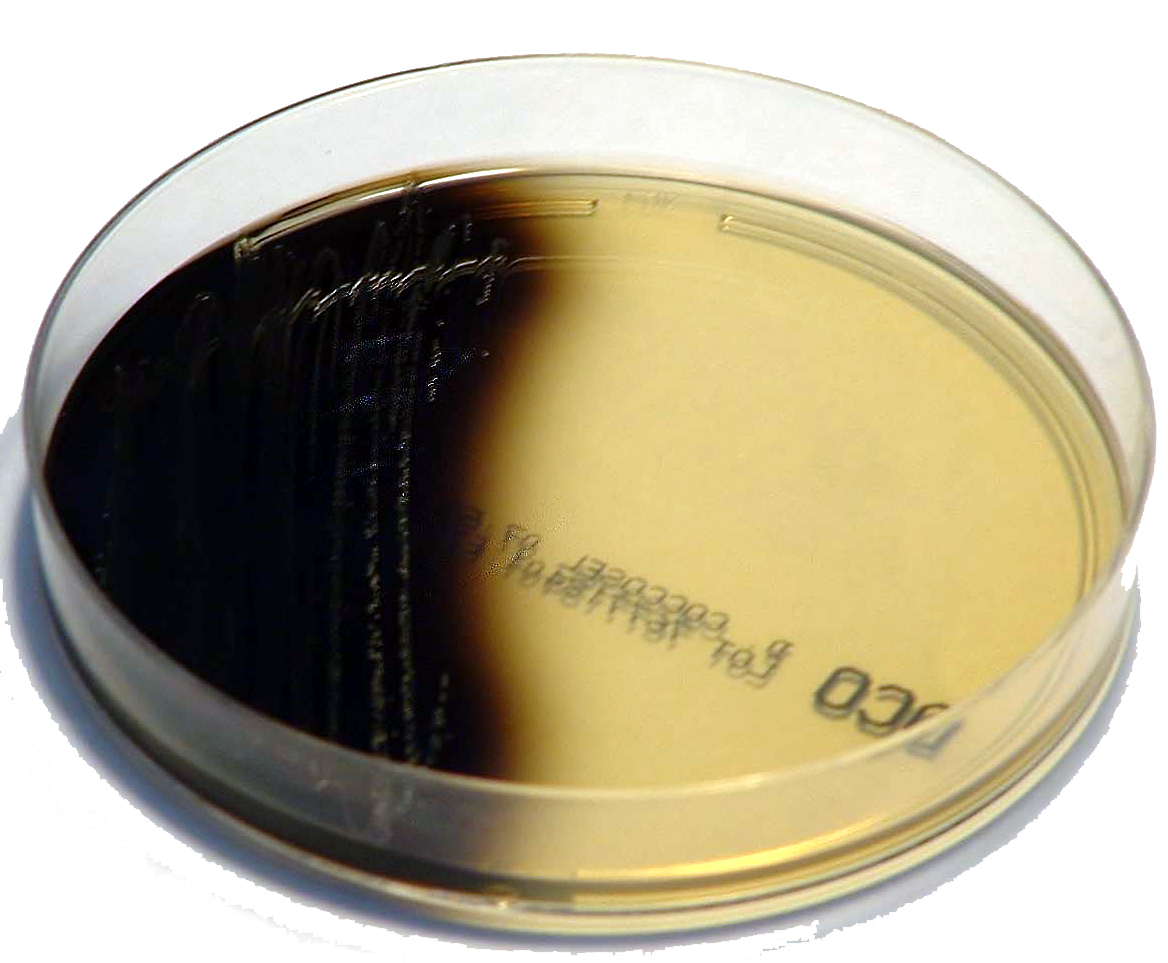 Enterococcus faecalis sur milieu bile-esculine Photo personnelle 23.05.2005 Philippinjl